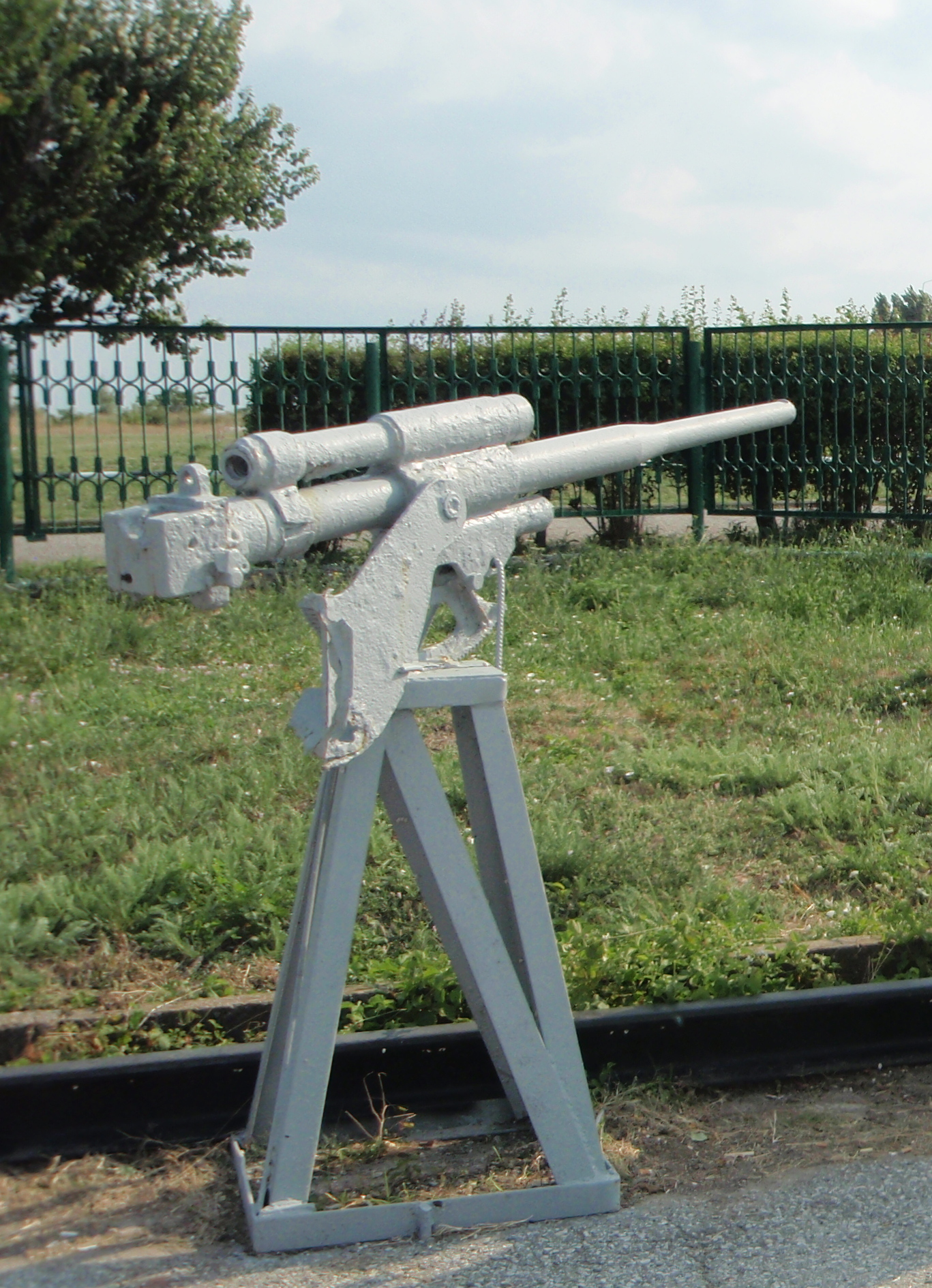 Советская 45-мм корабельная пушка 21-К в музее-заповеднике «Малая земля» (г.Новороссийск)